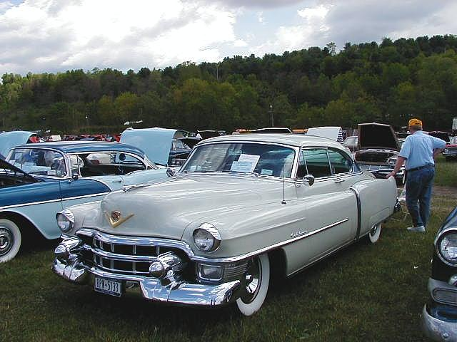 1953 Cadillac Series 53-6237(X) Coupe